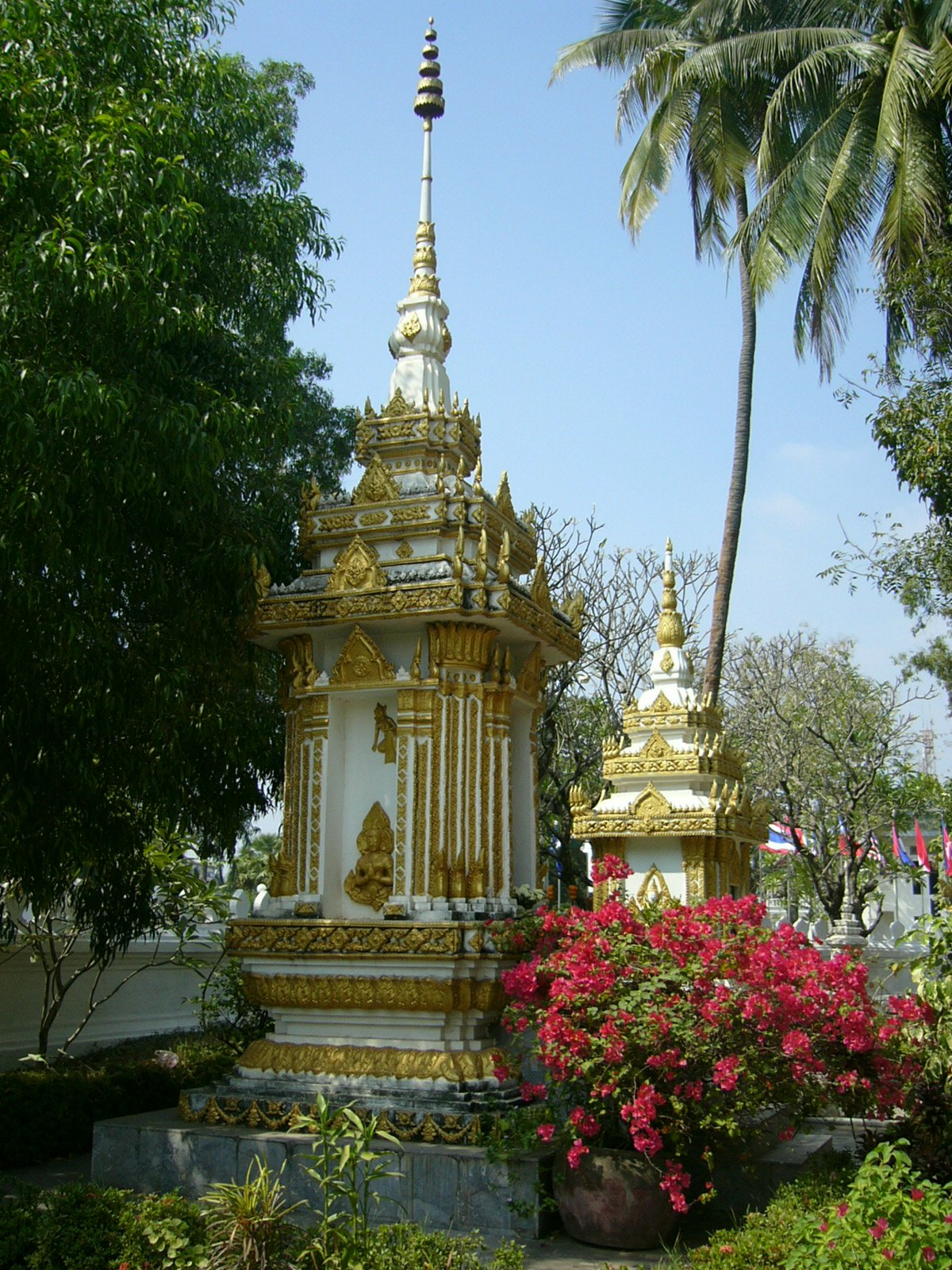 Wat Si Saket in Vientiane (Laos).